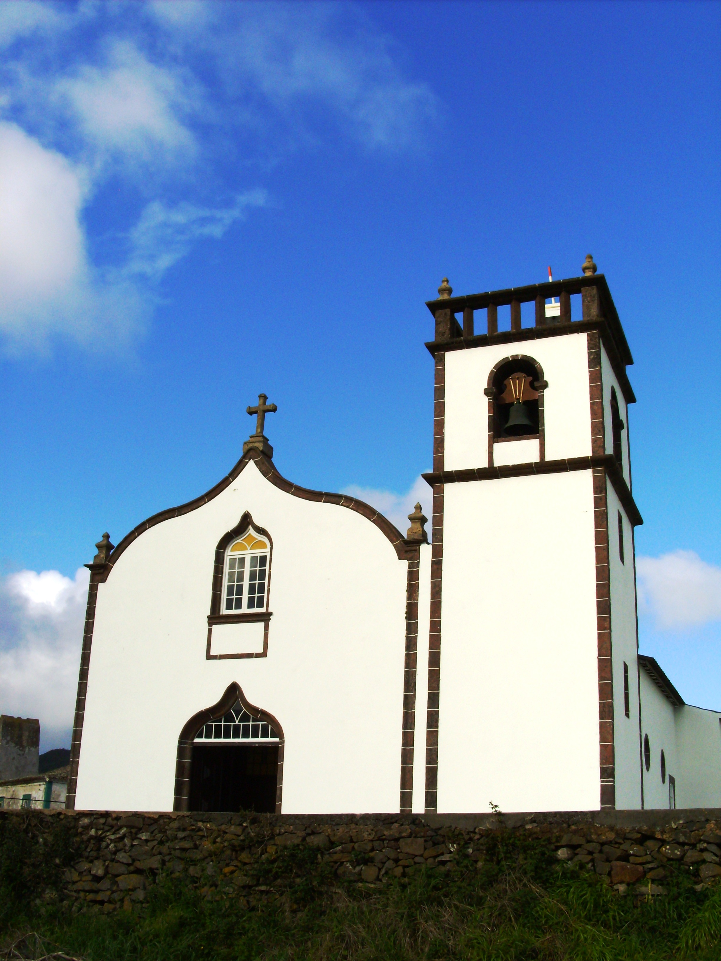 Igreja de Nossa Senhora do Bom Despacho (Almagreira), Ilha de Santa Maria (Açores), Portugal.